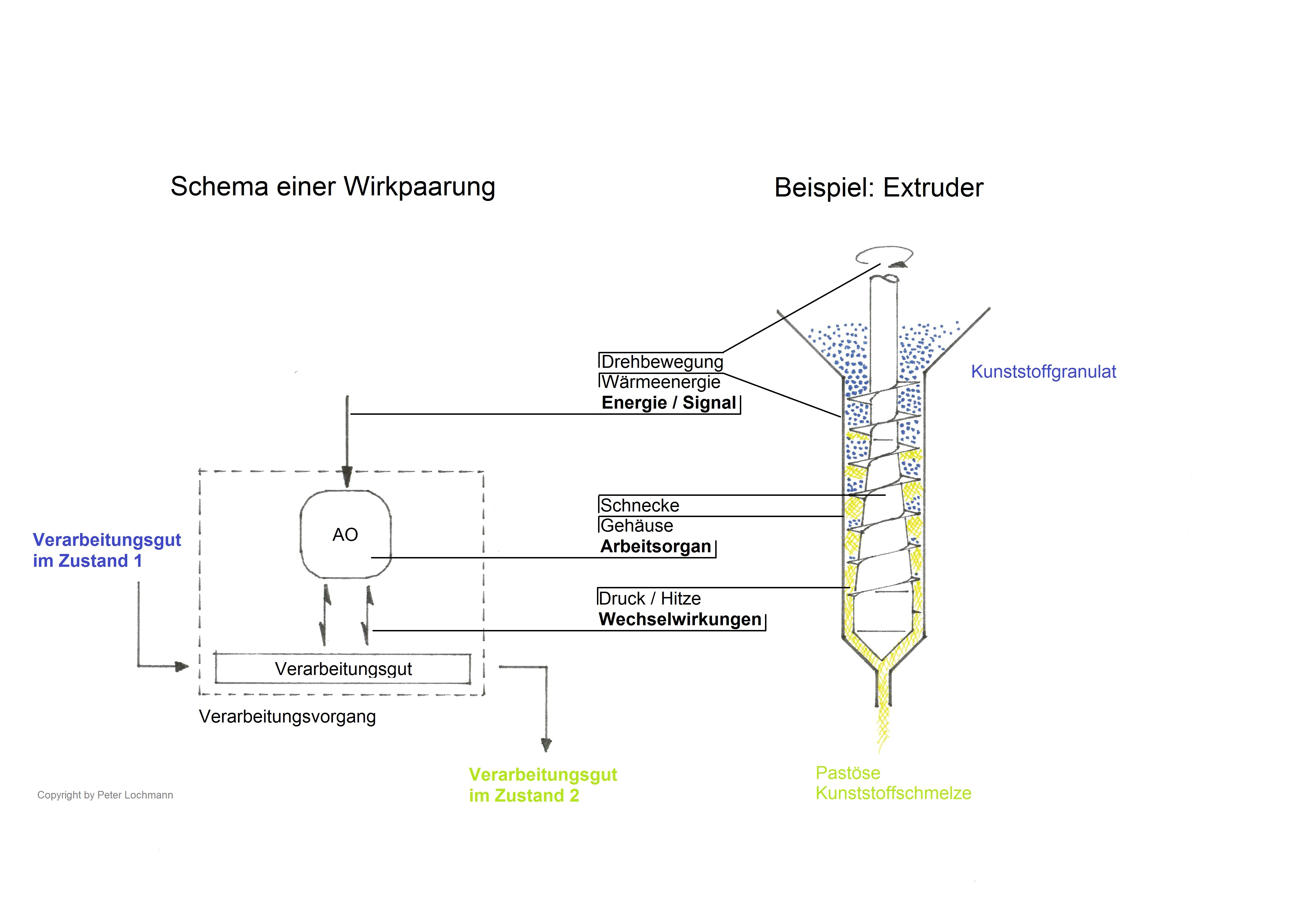 Schematischer Aufbau einer Wirkpaarung aus Verarbeitungsgut und Arbeitsorgan. Zustandsänderung des Verarbeitungsgutes durch Energieeintrag. Wechselwirkungen zwischen Arbeitsorgan und Wirkpaarung. Beispiel einer Wirkpaarung: Extruderschnecke und Kunststoffgranulat.